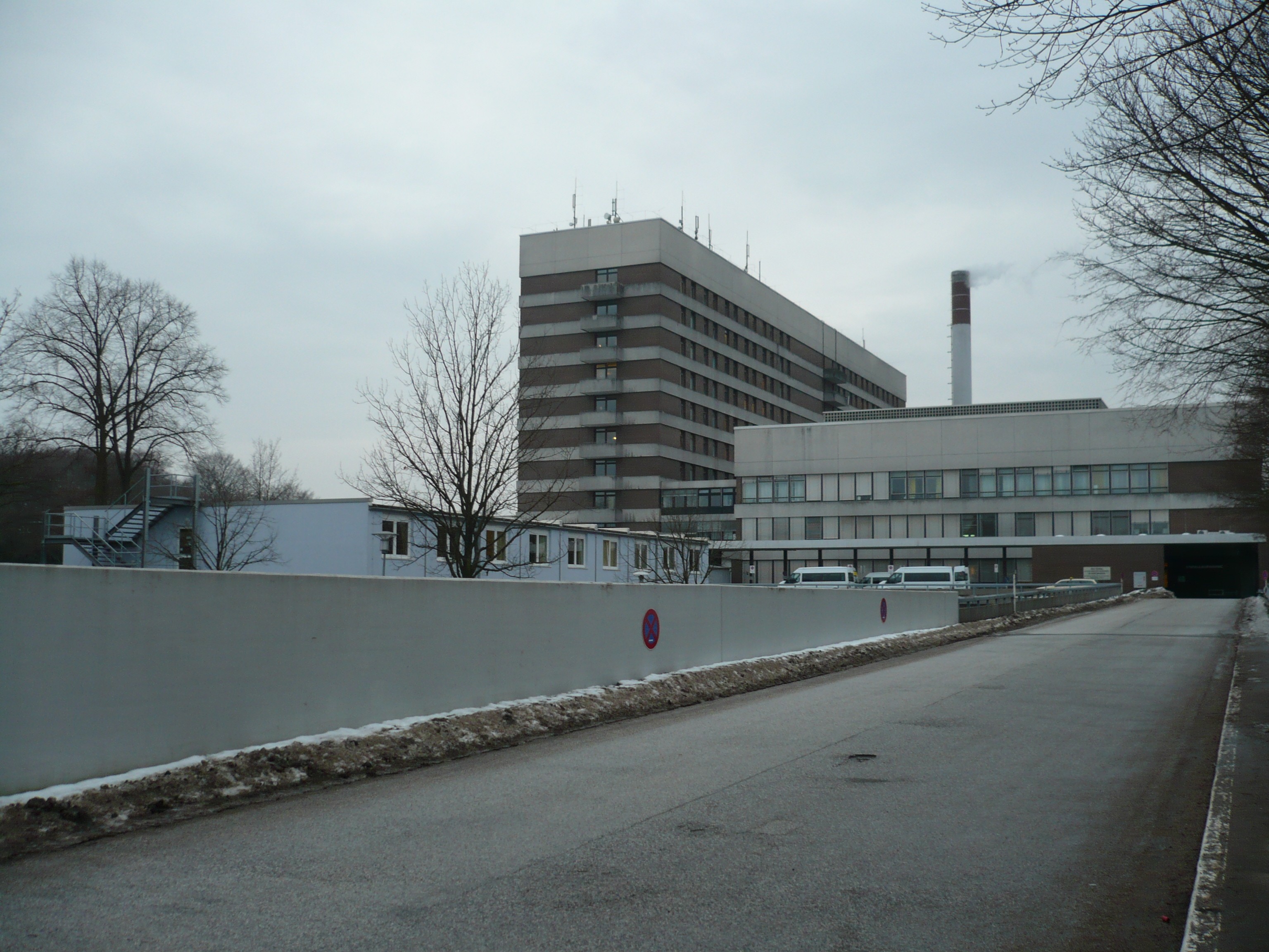 Asklepios Klinik Wandsbek, Hamburg Zufahrt Notaufnahme (Nur für Krankenwagen und Dienstfahrzeuge)